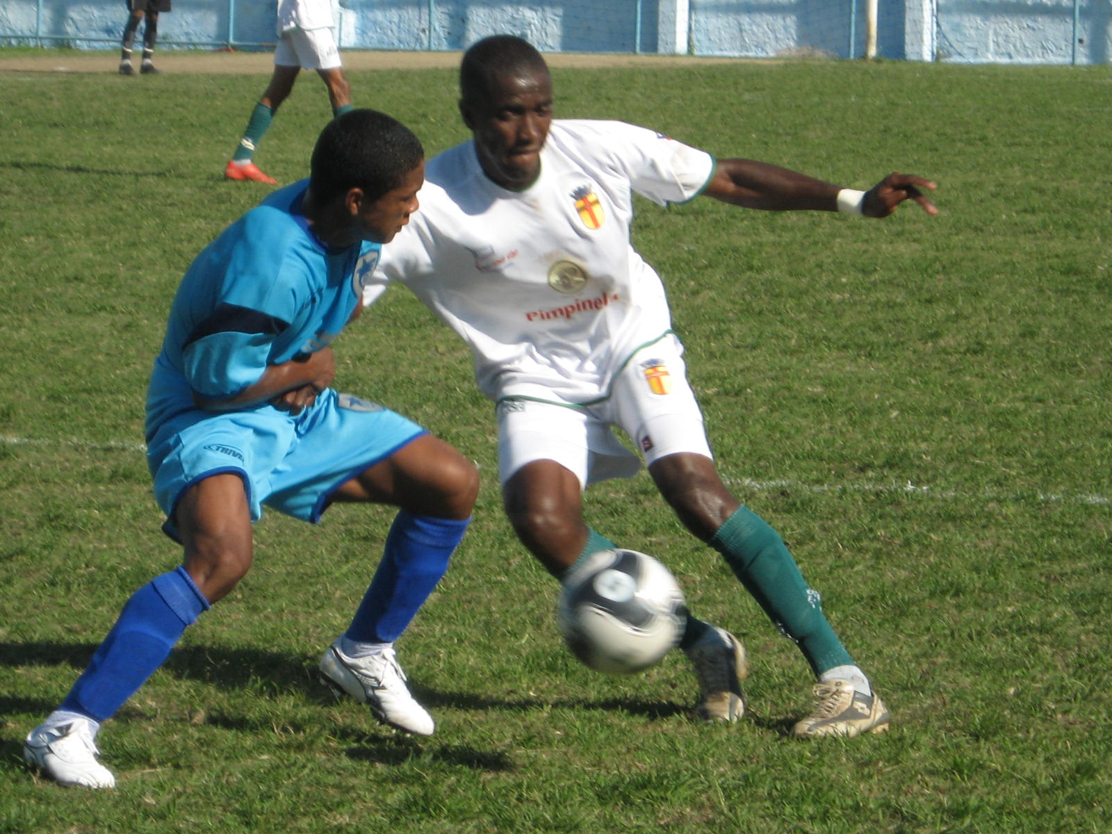 Partida disputada entre Santa Cruz 1x0 Leme, pela Terceira Divisão, de 2009.